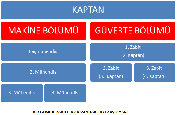 Bir ticari gemide zabitlerin bağlı bulunduğu organizasyonel hiyerarşi